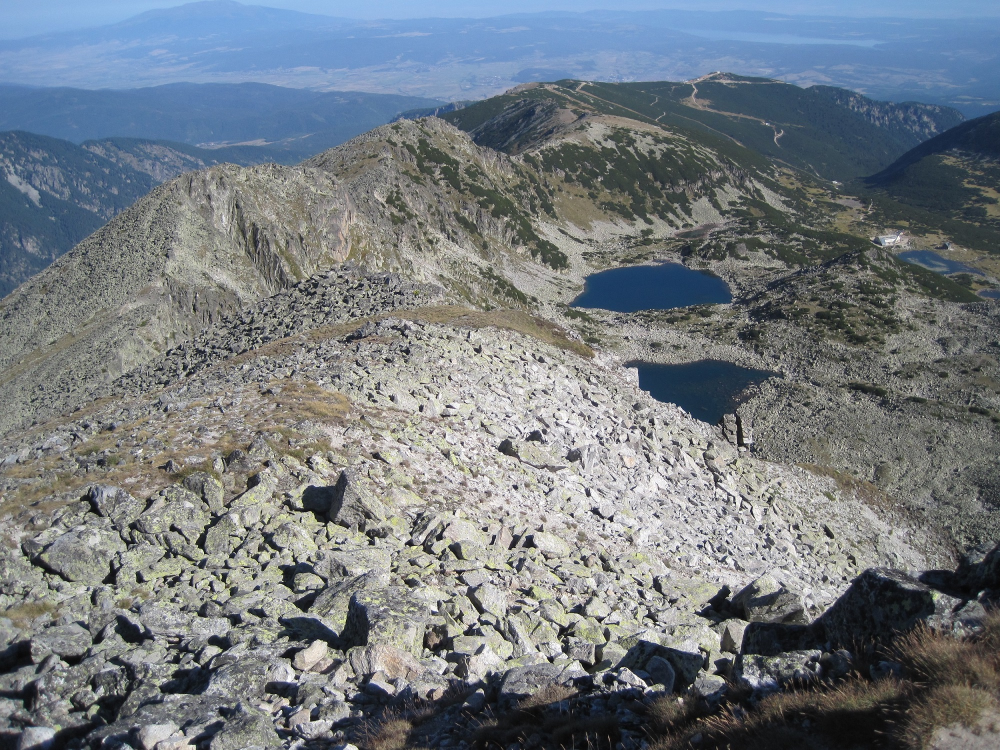 Върховете Безименния с Безименното езеро и Алеко с Алековото езеро (отляво надясно), погледнати откъм Мусала